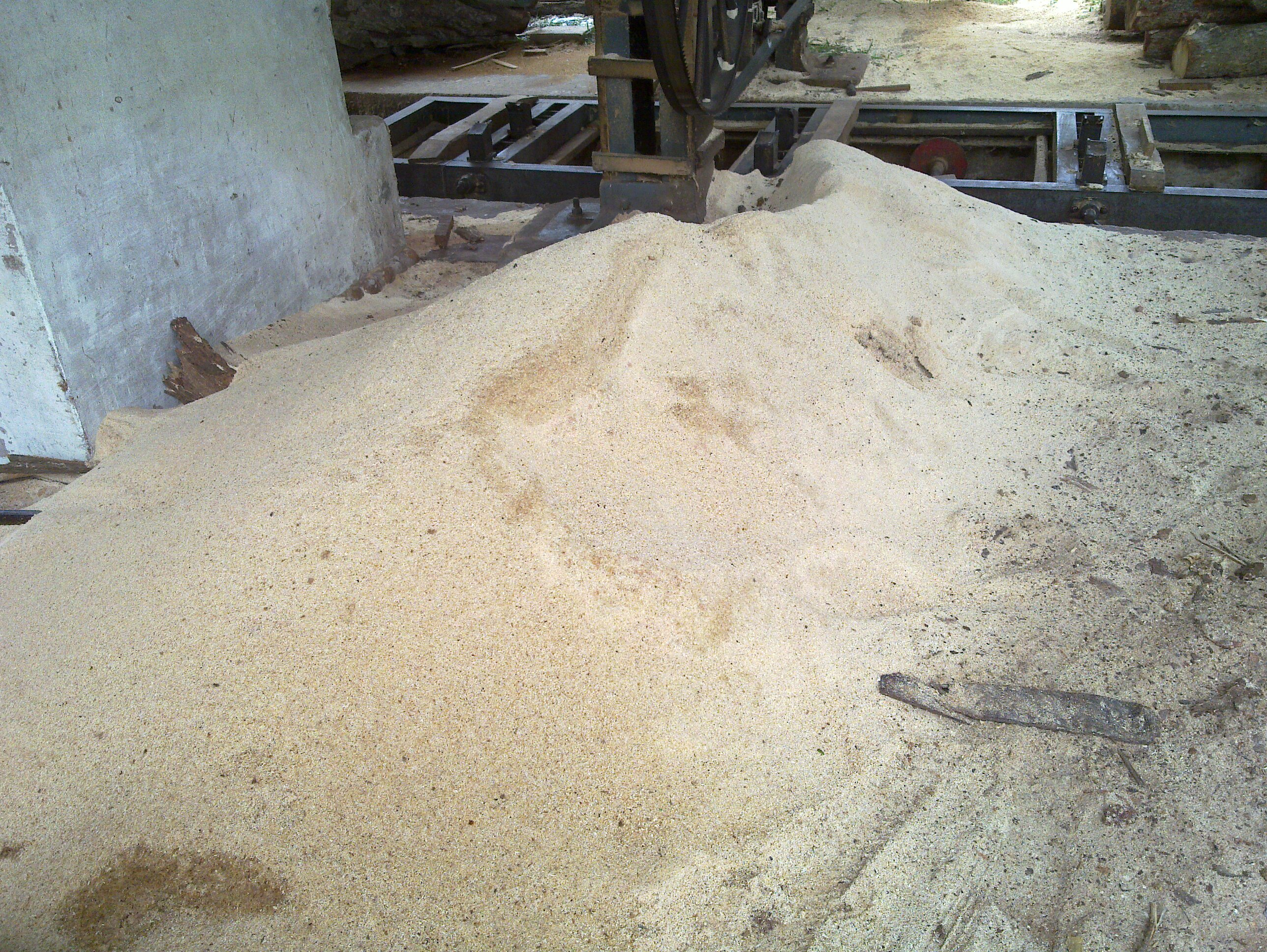 மரத்தூள்